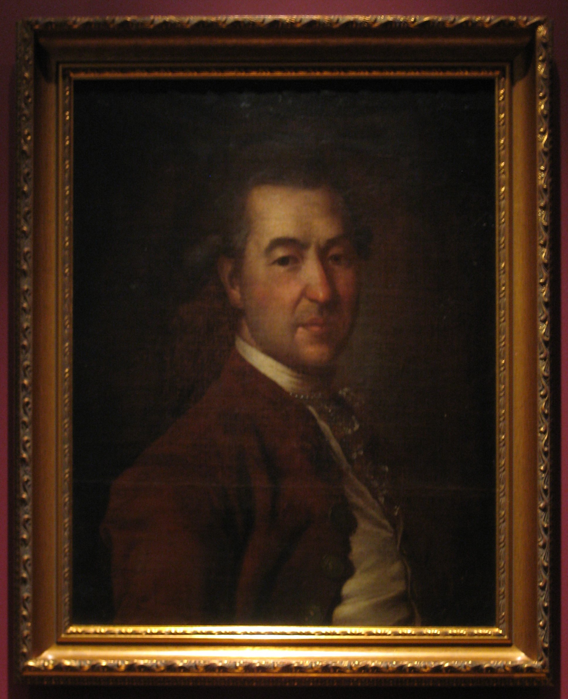 Выставка "Национальная портретная галерея", 2012.